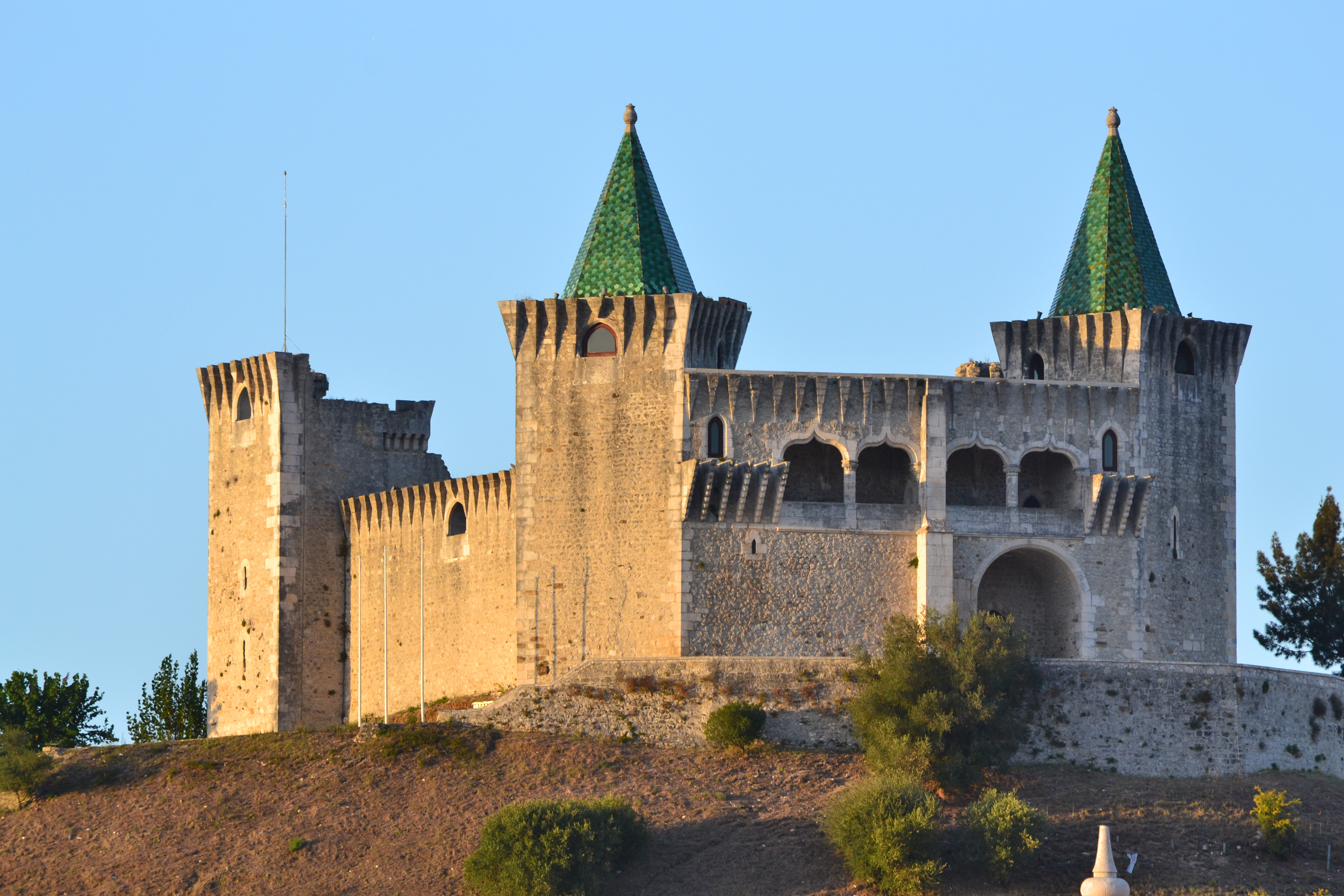 Castelo de Porto de Mós, vista do jardim This file was uploaded for Wiki Loves Monuments in Portugal with the unique identifier 69870.